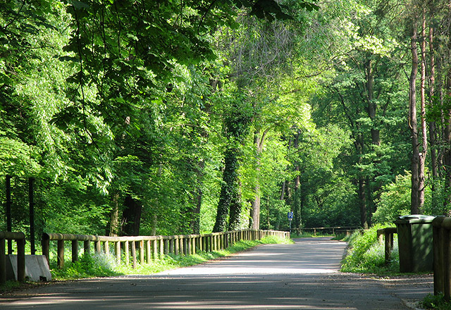 Parco di Monza